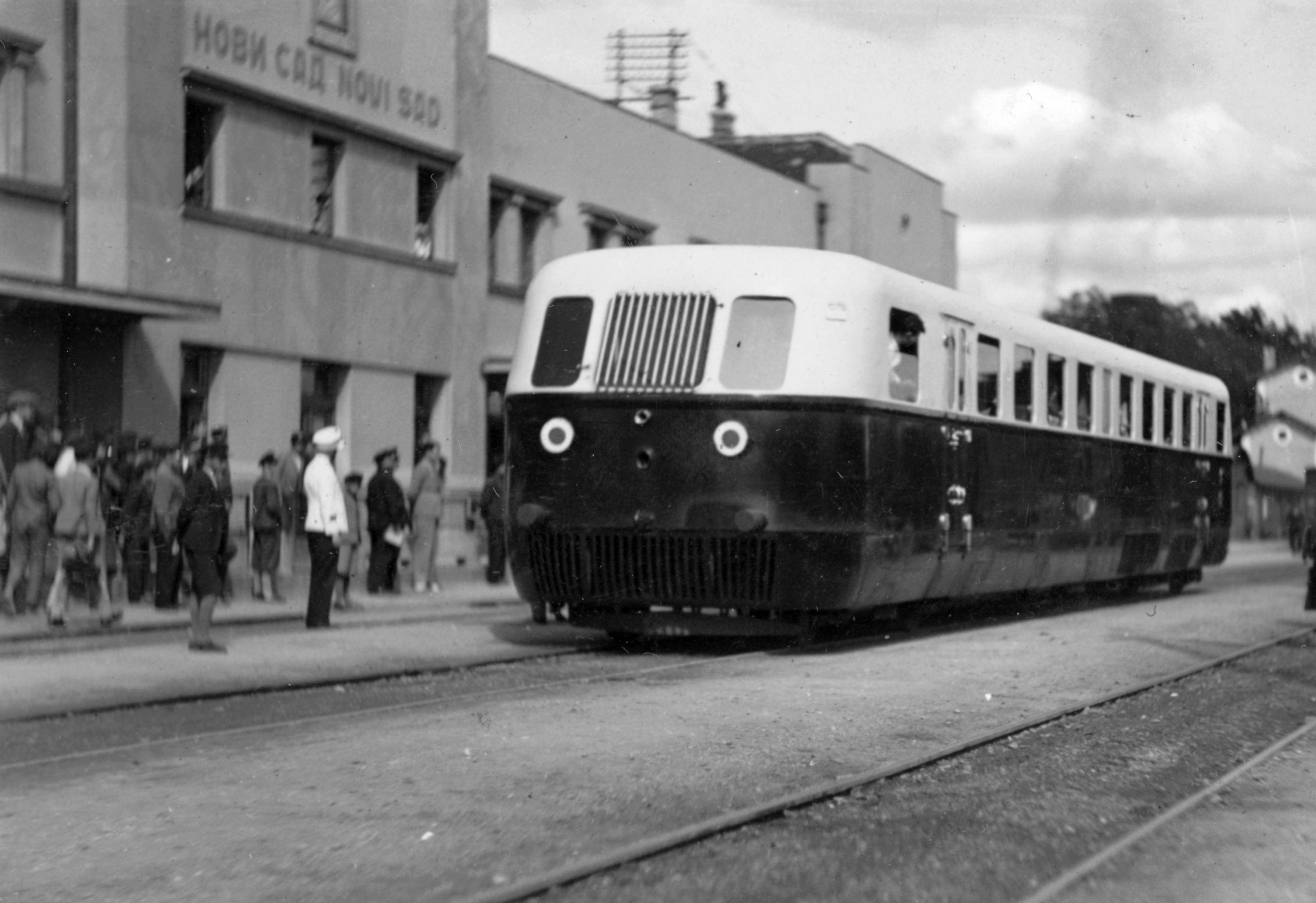 Ganz gyártmányú Árpád sorozatú (TAS) sínautóbusz. Location: Serbia, Novi Sad Tags: rail, railway, Hungarian brand, Ganz-brand Title: Ganz gyártmányú Árpád sorozatú (TAS) sínautóbusz.